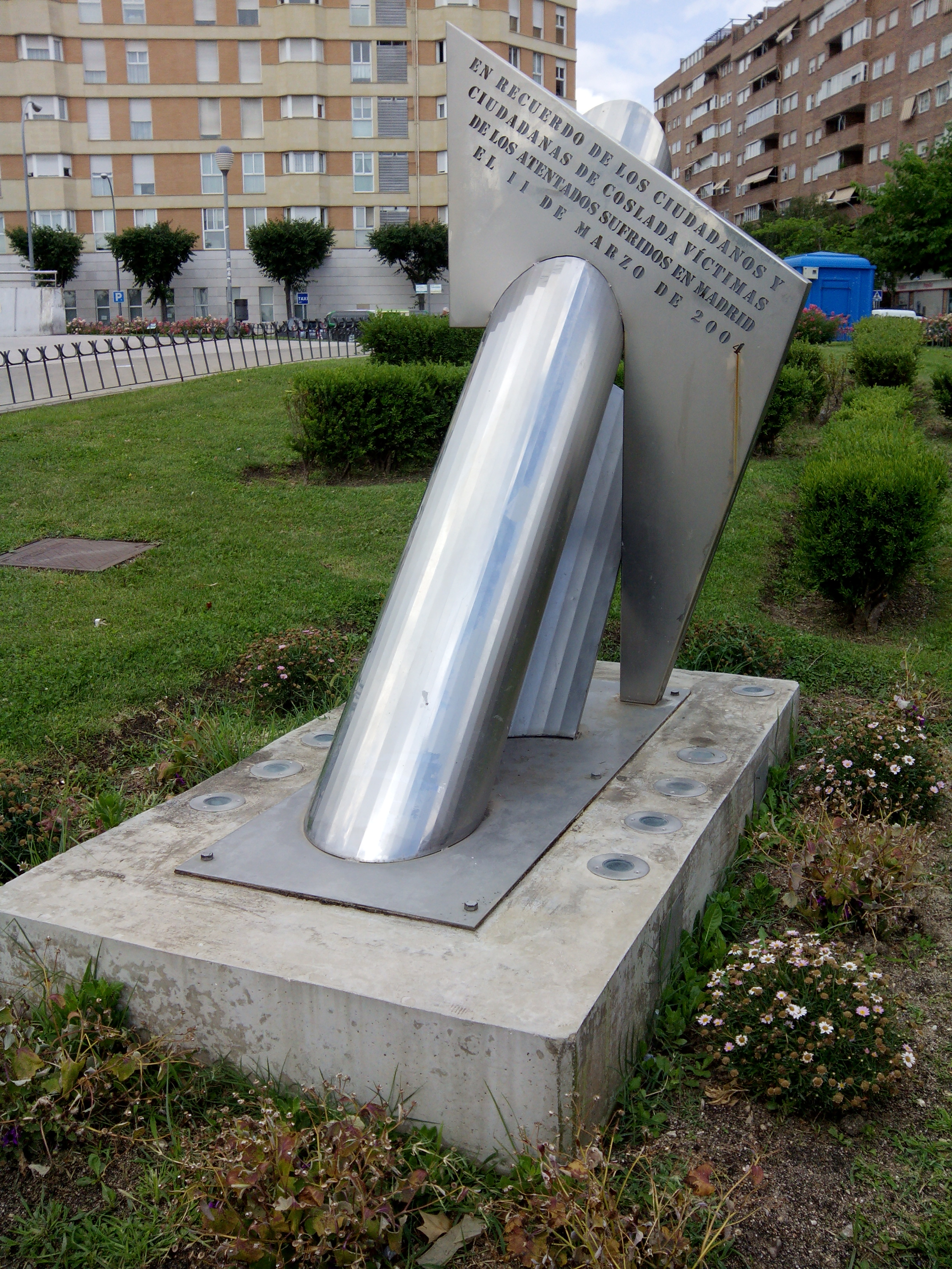 Monumento a las victimas